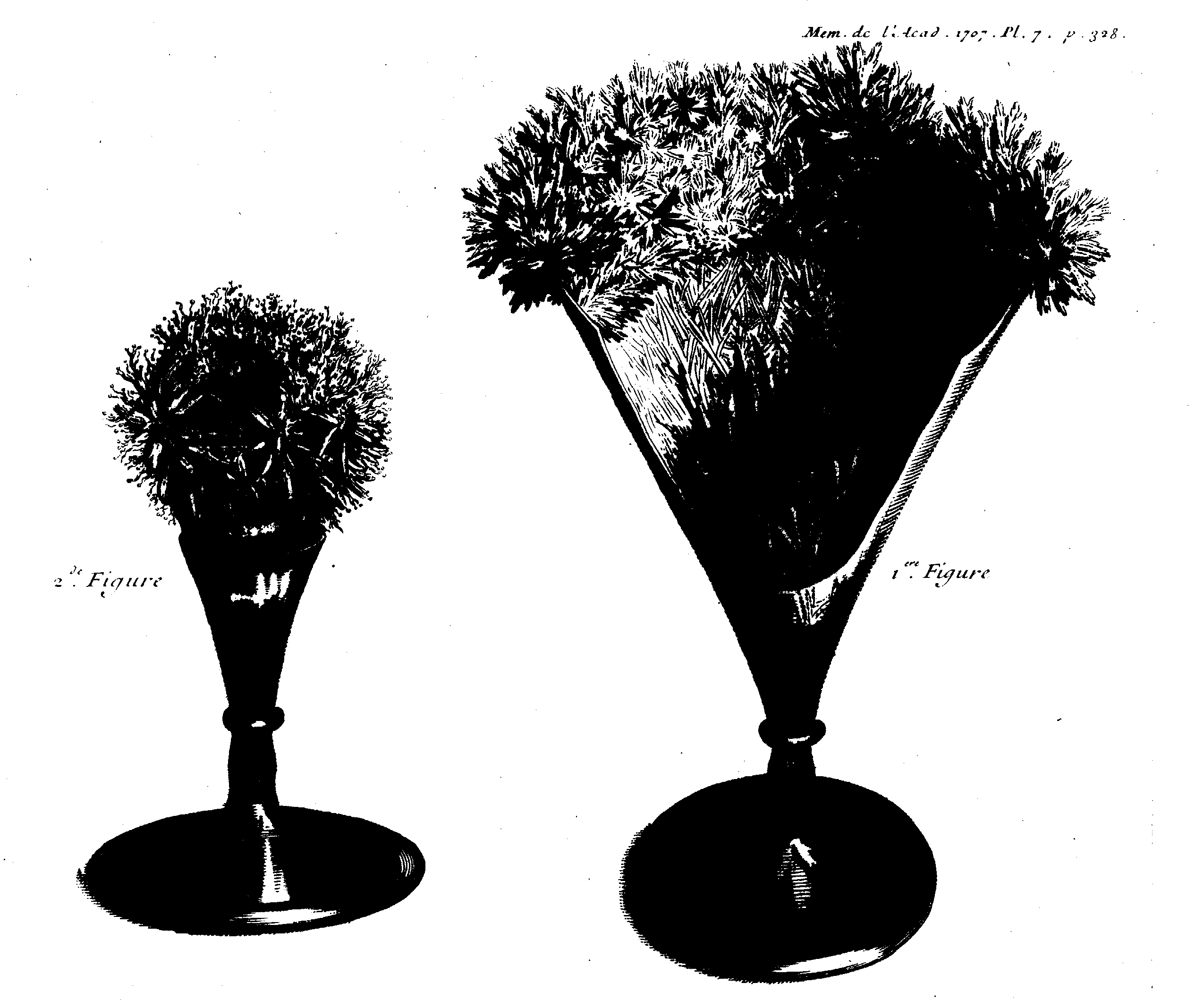 Reflexions et obſervations diverſes sur une vegegation Chimique du Fer, & ſur quelques experiences faites à cette occaſion avec diﬀerentes liqueurs acides & alkalines, & avec diﬀérens métaux ſubſtituez au Fer. par M. Lemery le ﬁls